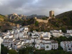 Cazorla al atardecer desde el balcón de las herrerías